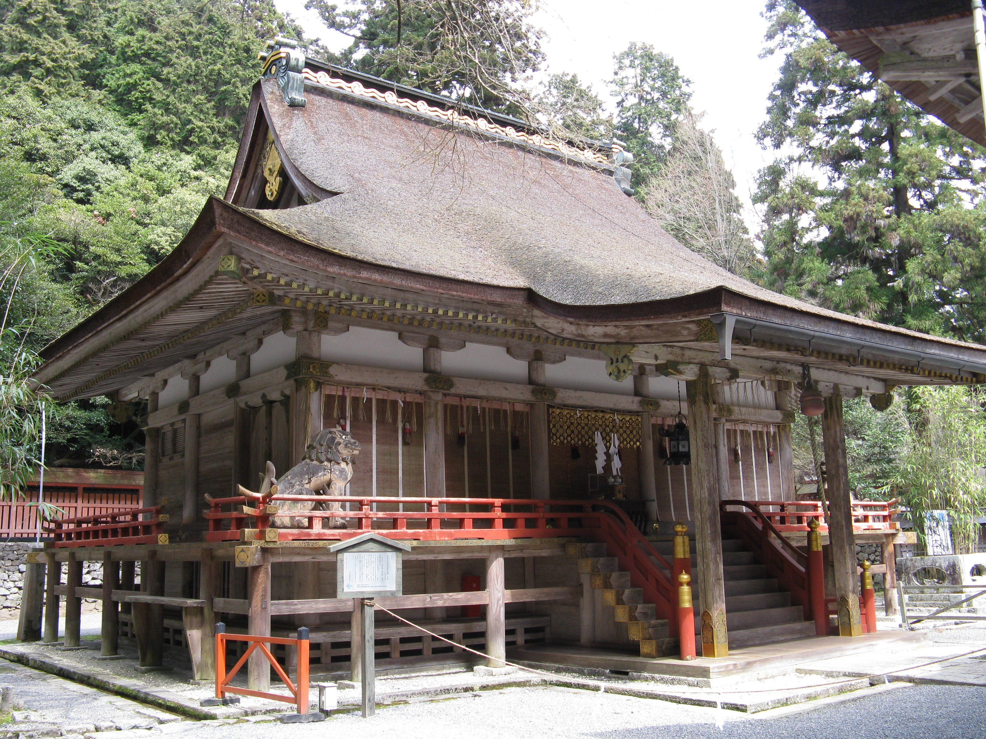 日吉大社 西本宮本殿